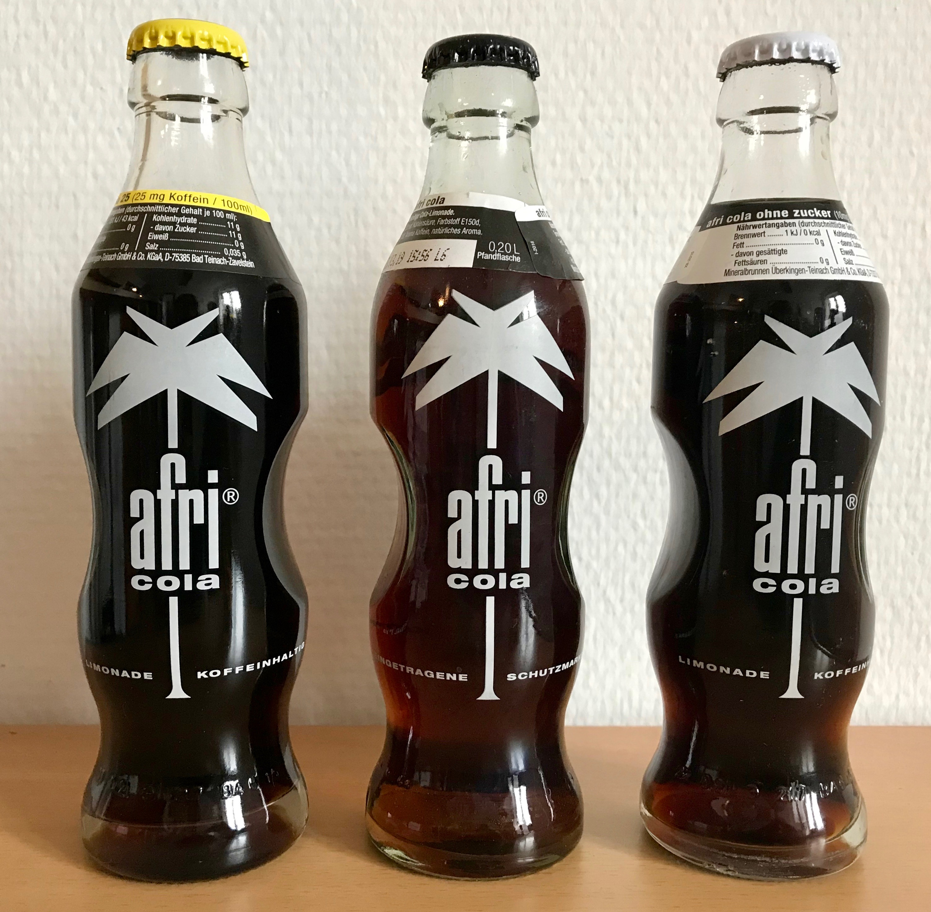 Aktuelles Flaschendesign 0,2 Liter Flasche mit der typischen Einkerbung